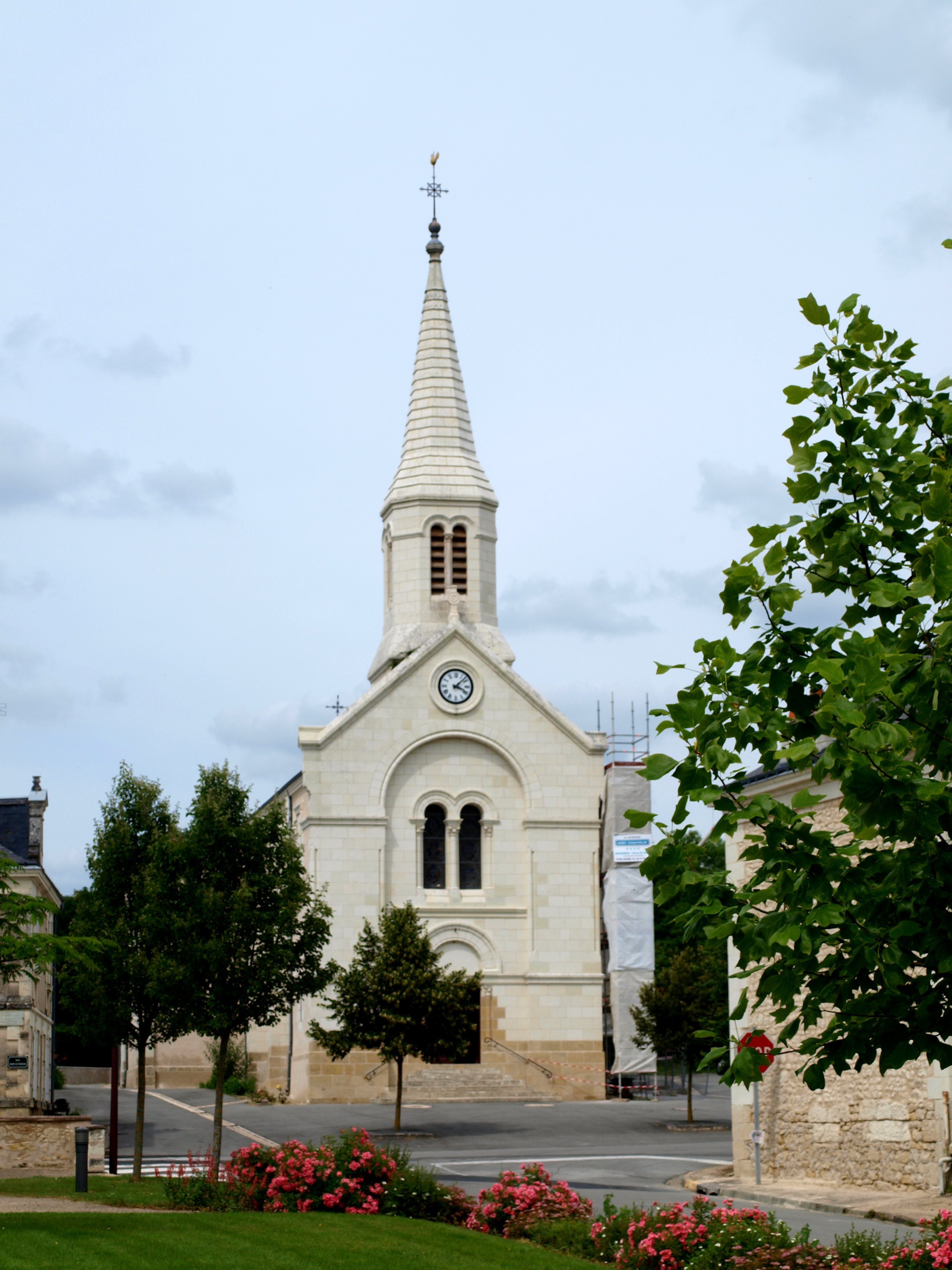 Noyant-de-Touraine (Indre-et-Loire, France) ; église